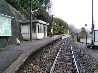 2005年3月28日に投稿者が天神山駅にて撮影。